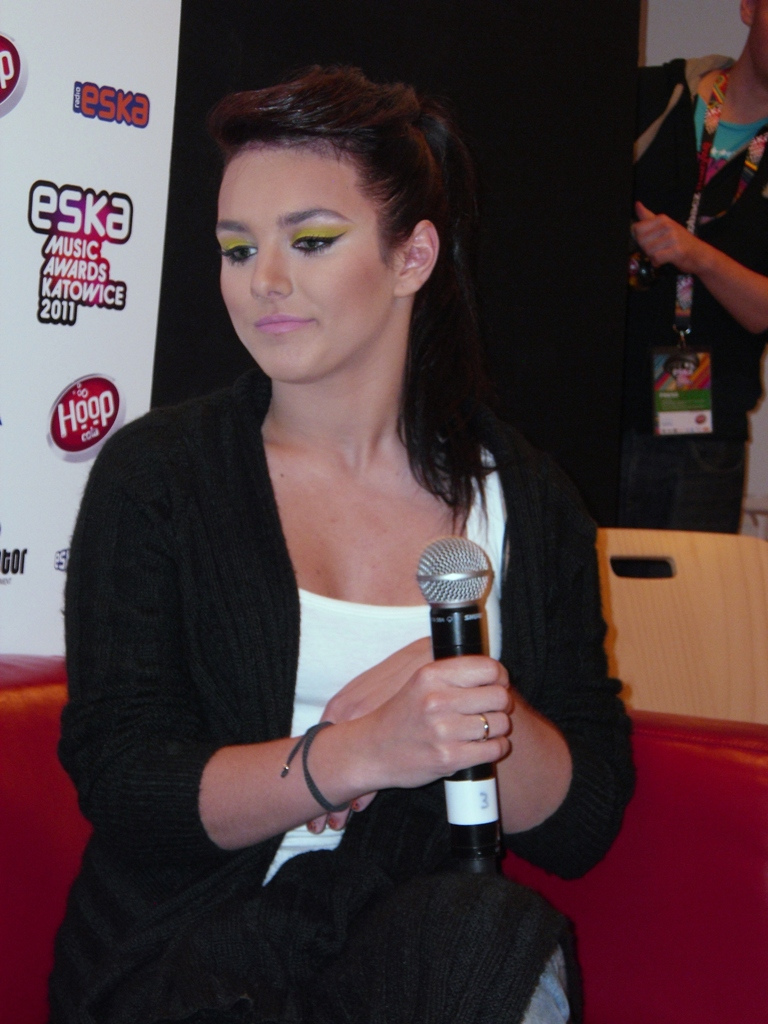 Ewa Farna Zdjęcie zrobione podczas Eska Music Awards 2011 w katowickim Spodku.